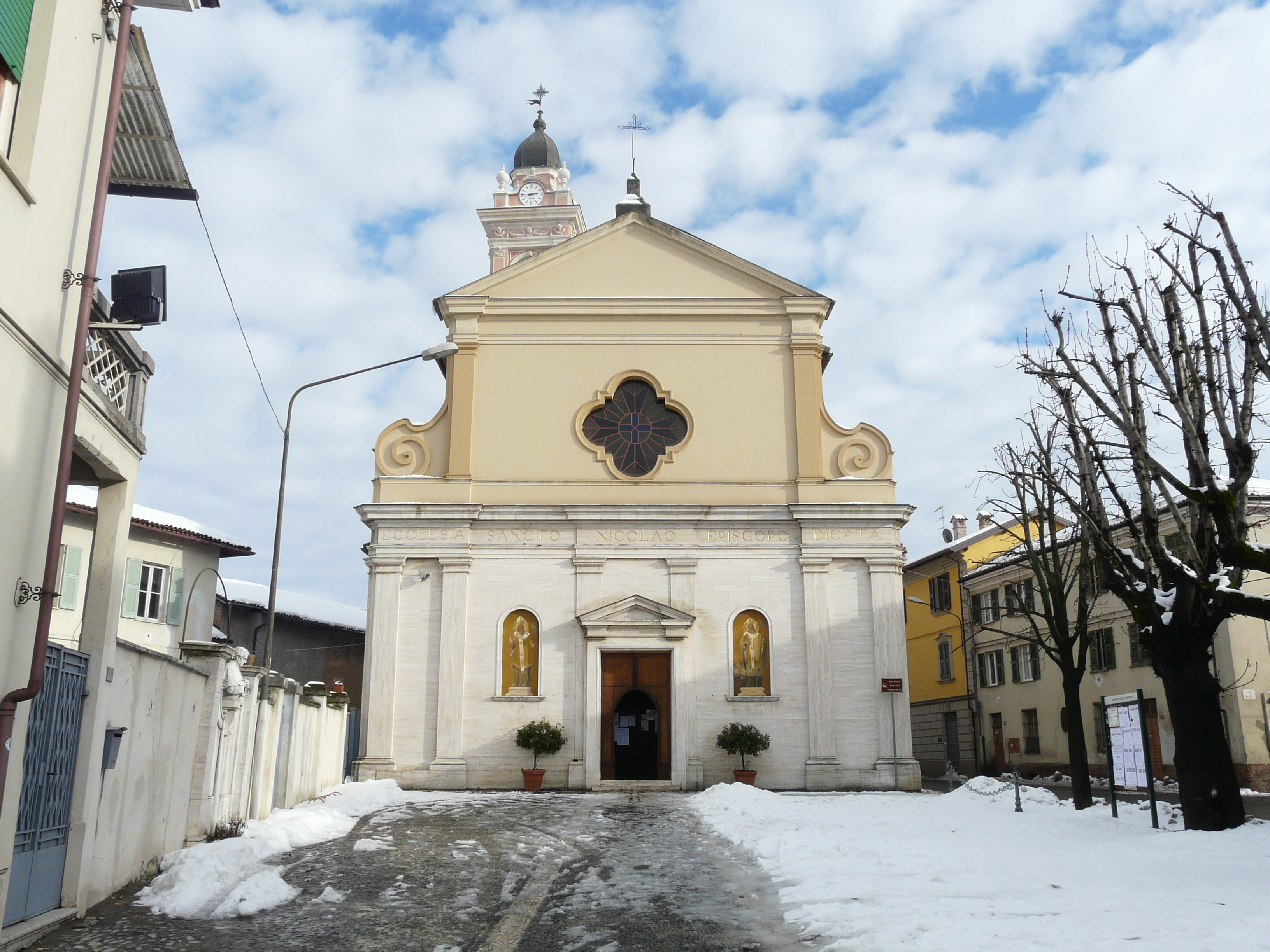 Chiesa di San Nicolò di Pozzolo Formigaro, Piemonte, Italy